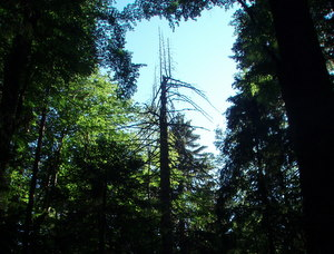 Klepina duliba